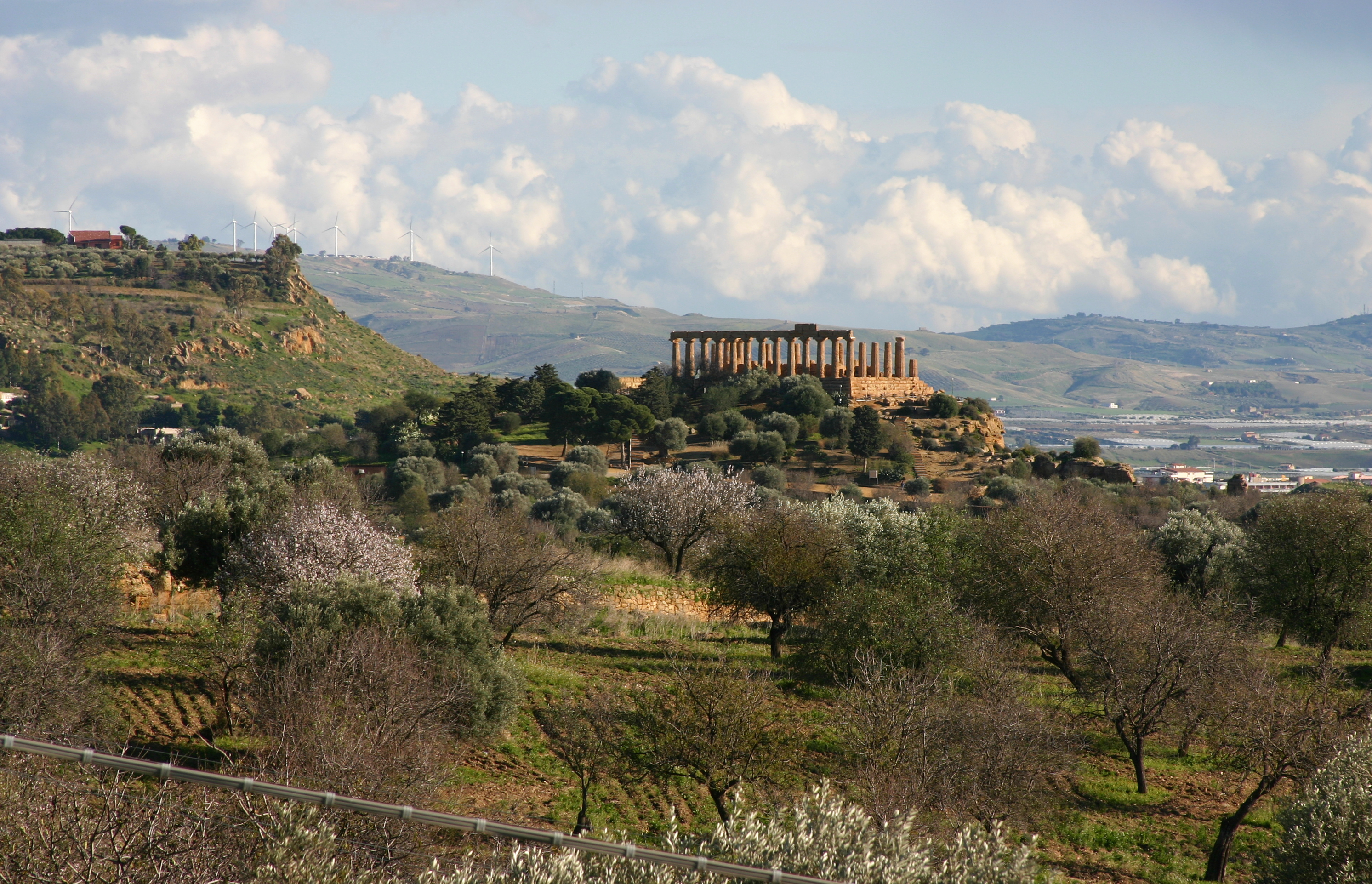 Views of Agrigento